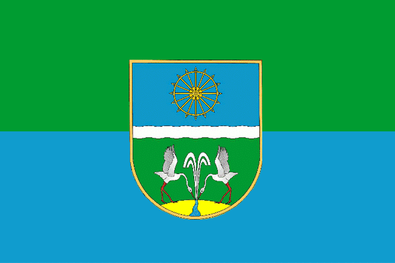 прапор села Теплиця